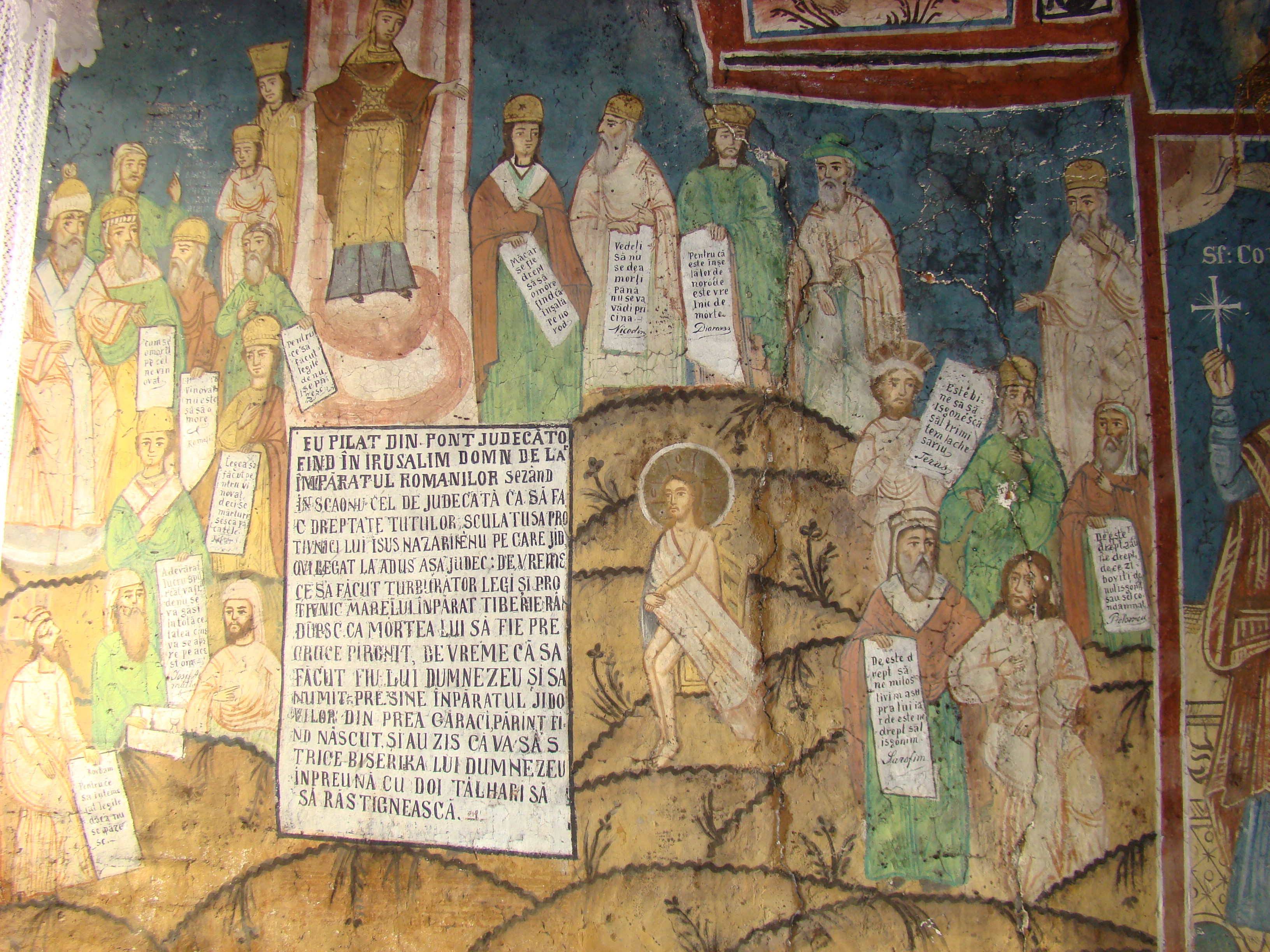 Biserica „Intrarea în Biserică a Maicii Domnului” sat Bărbătești, cătun Mierlești, județul Vâlcea